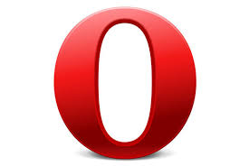 Opera (navegador)